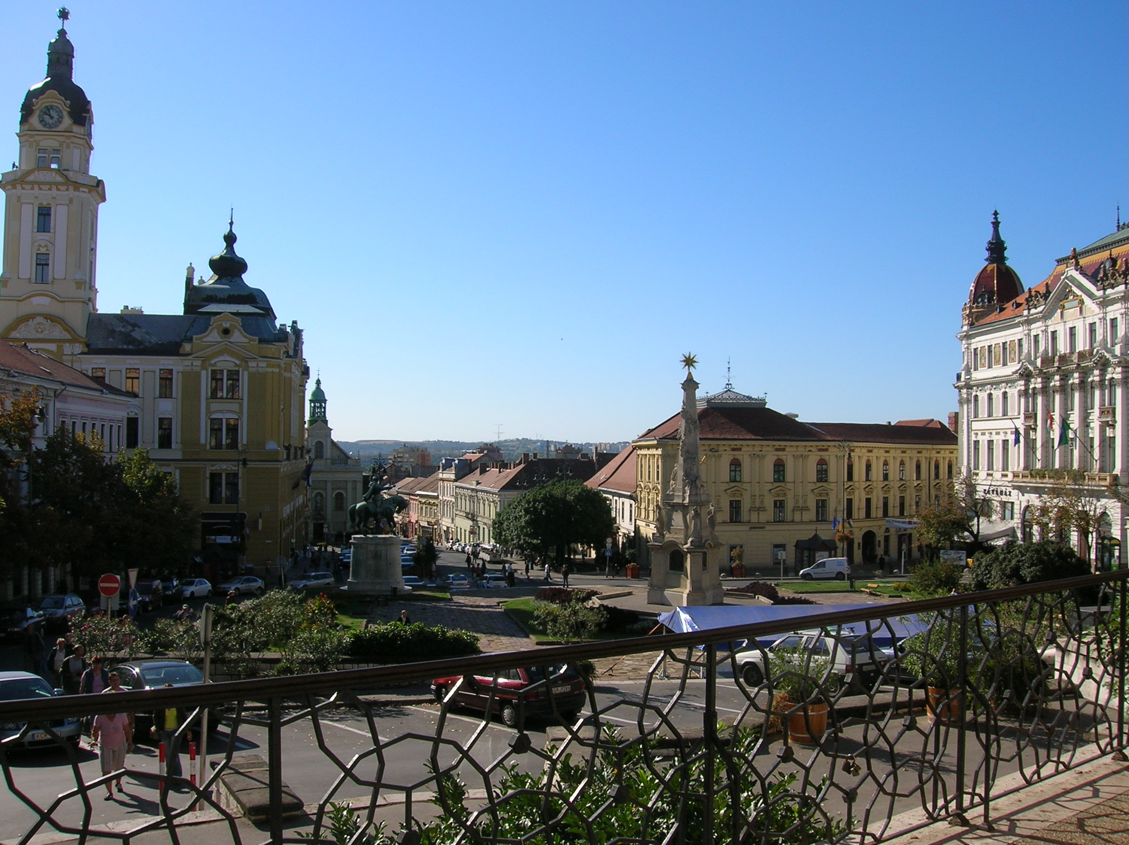 Széchenyi square, Pécs